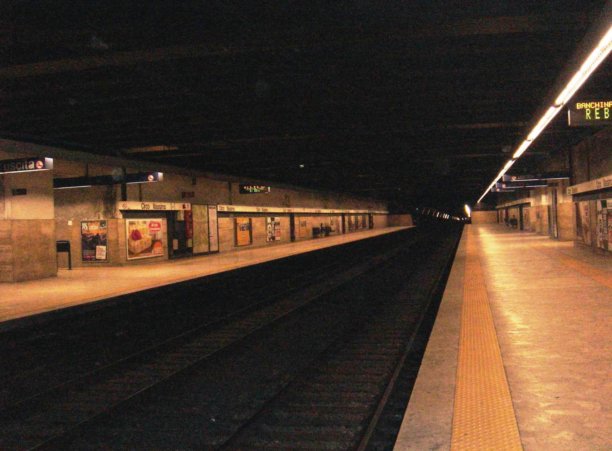 Roma, Stazione Metro B Circo Massimo